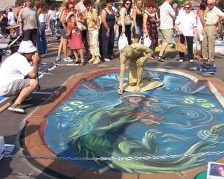 Lizenz Pablo Zibes